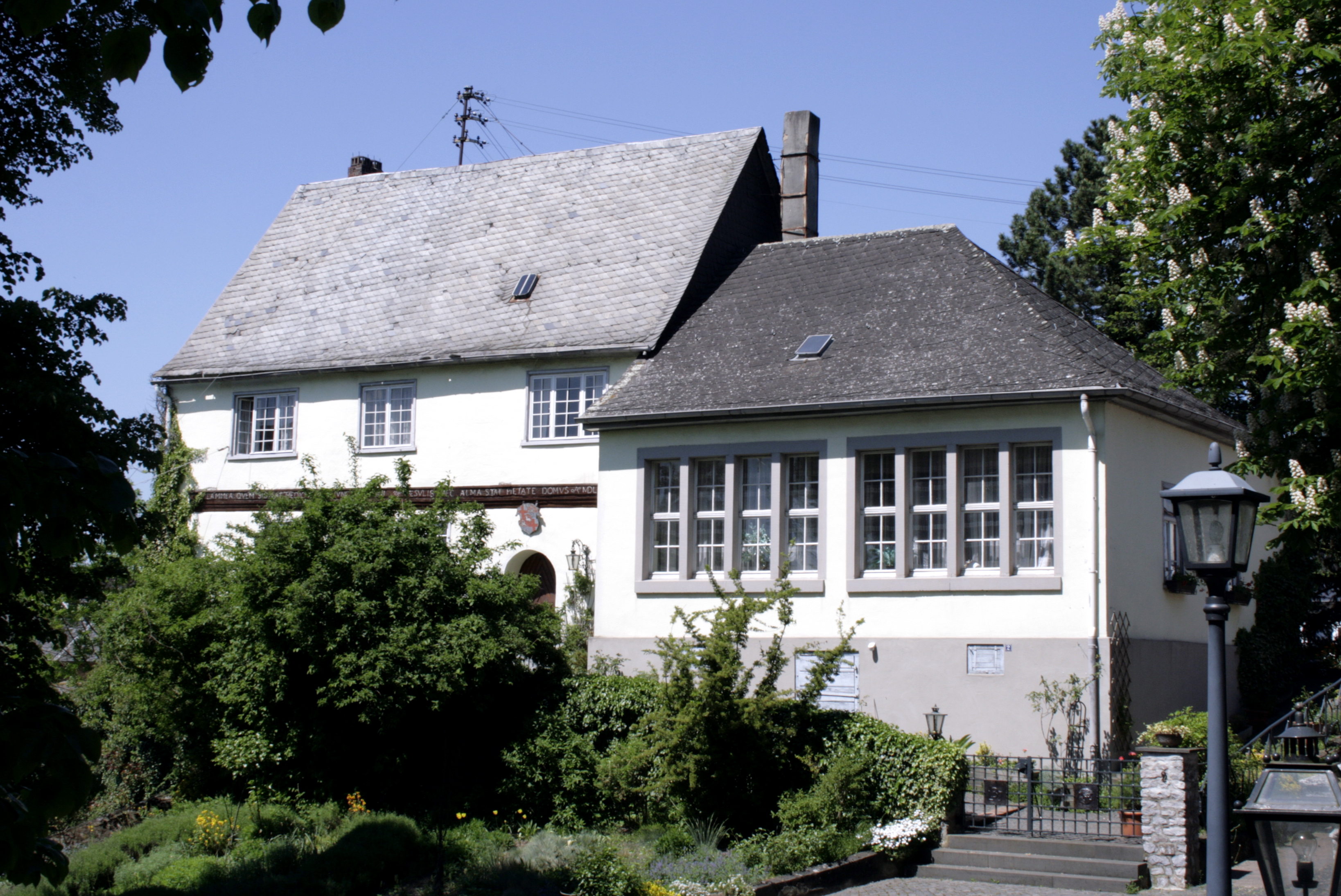 Alte Schule von Dietkirchen, Deutschland